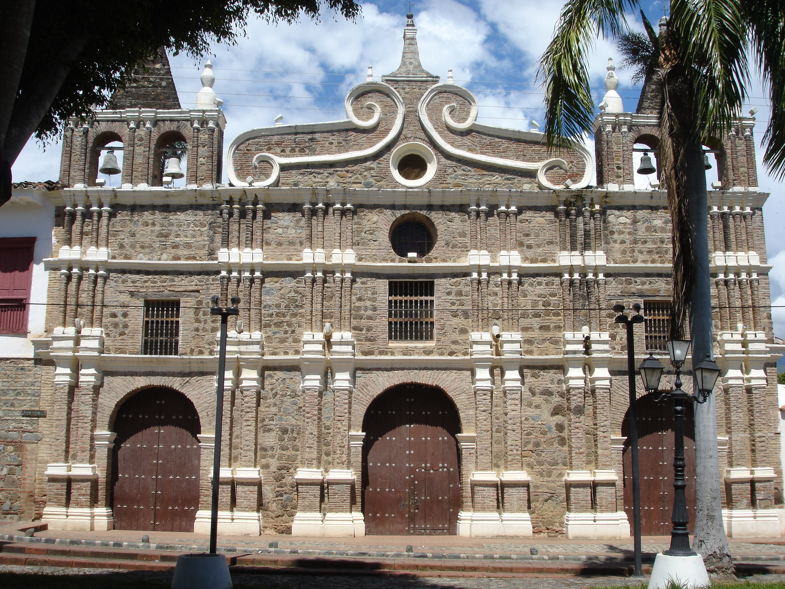 Iglesia de Santa Bárbara en Santa Fe de Antioquia. Colombia.